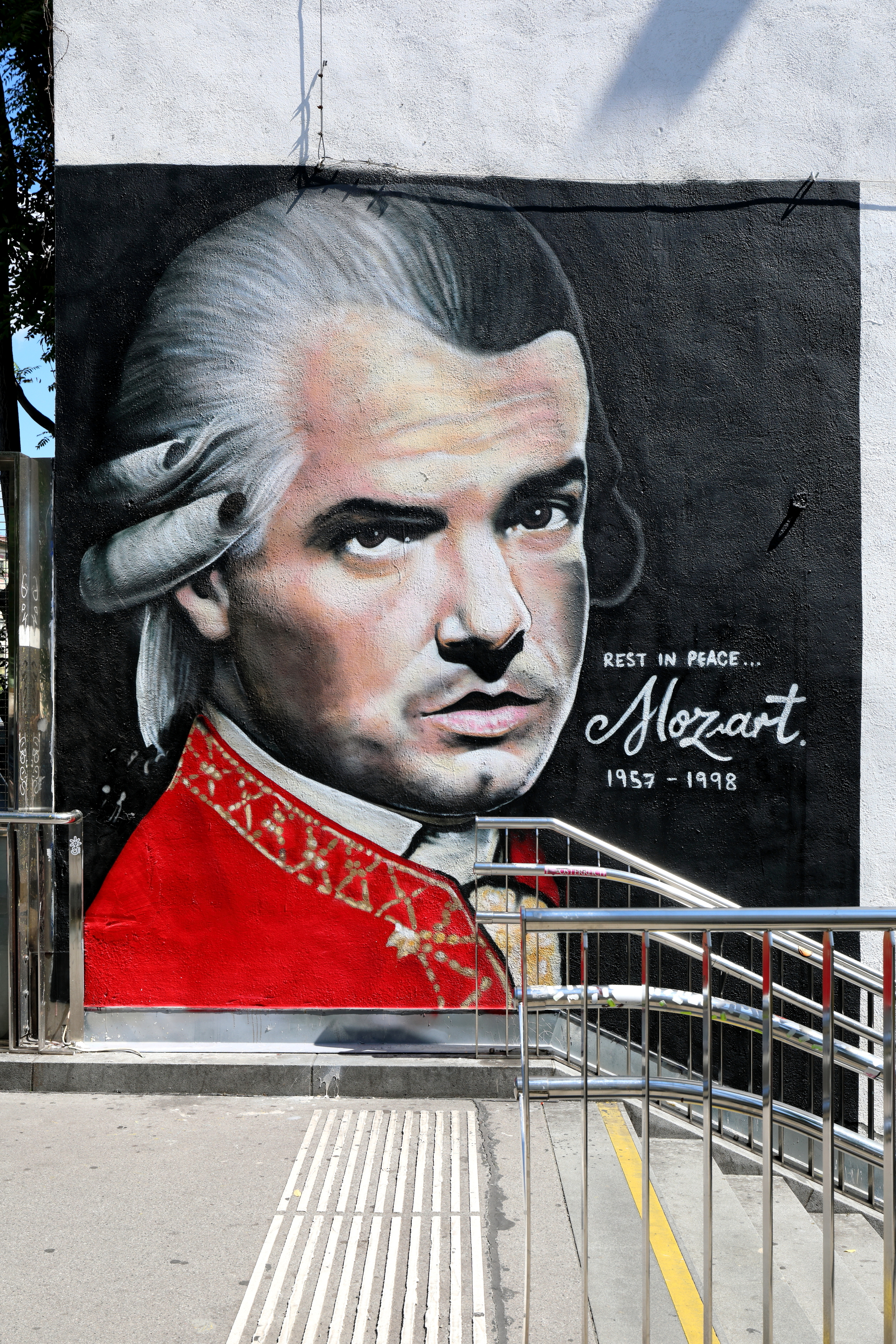 Ein Graffito von dem australischen Künstler Lush Sux bei der Falco-Stiege nächst der U-Bahnstation Kettenbrückengasse in der österreichischen Bundeshauptstadt Wien. Das Graffito stellt Falco in Mozart-Outfit dar - in Anspielung auf seinen Welthit Rock Me Amadeus.